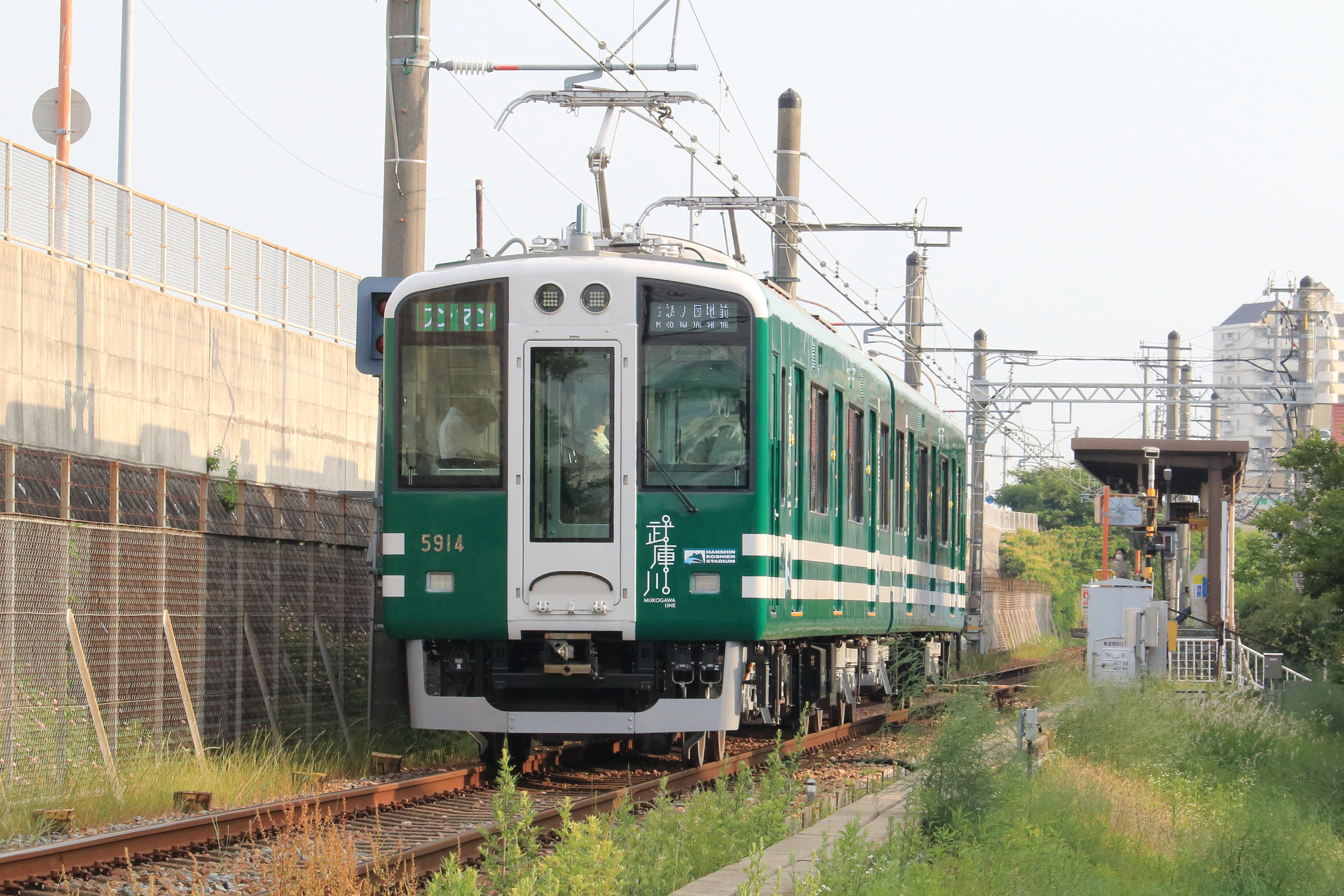 阪神5500系 武庫川線 甲子園号 洲先 - 東鳴尾間